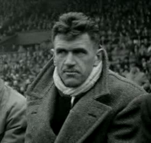 Jef Mermans. Vriendschappelijke voetbalwedstrijd Nederland - België 1-0 (rust 1-0) in het Olympisch Stadion in Amsterdam.